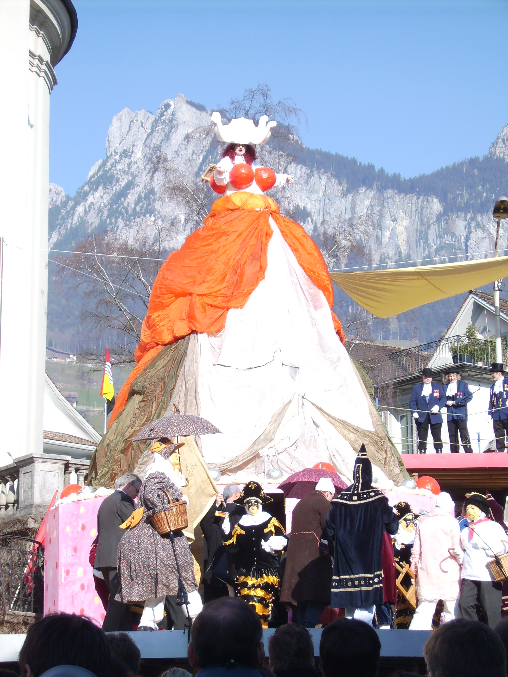 Japanesenspiel 2007